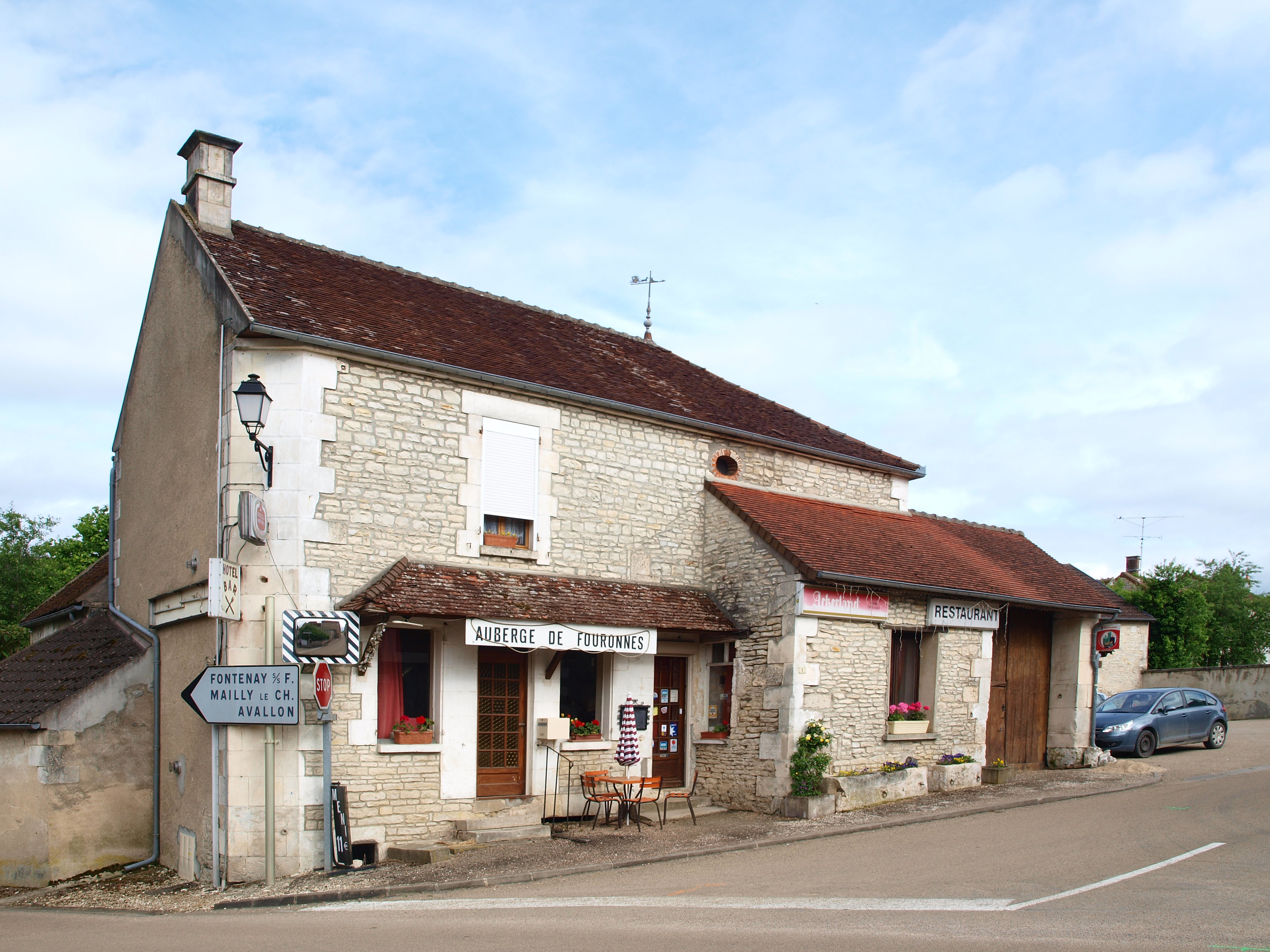 Fouronnes (Yonne, France) , auberge.